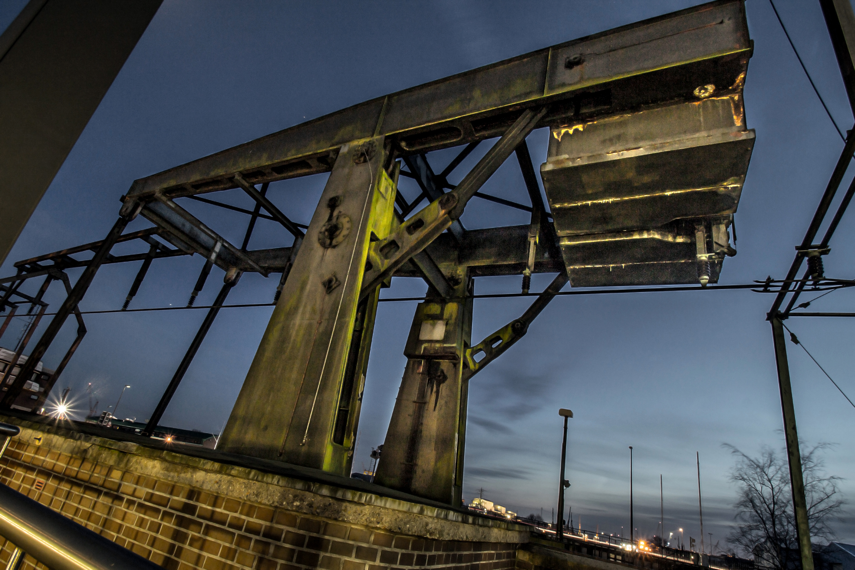 Eisenbahnbrücke